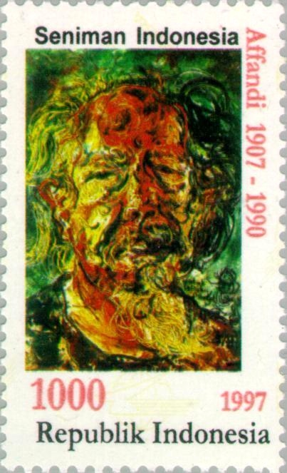 Affandi self-portrait